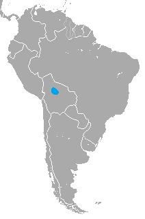 Distribución del Guacamayo Barba Azul